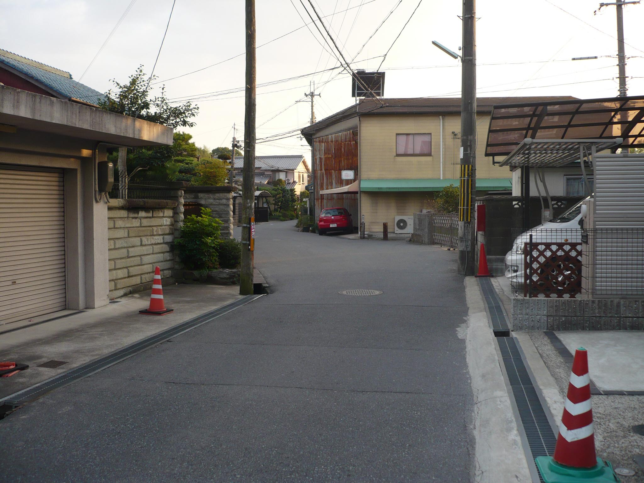 屈折する吉野街道